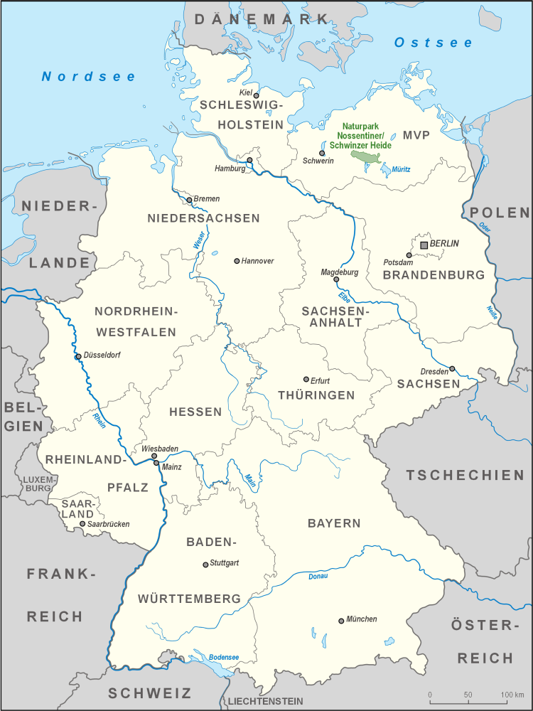 Karte des Naturparks Nossentiner/Schwinzer Heide in Deutschland